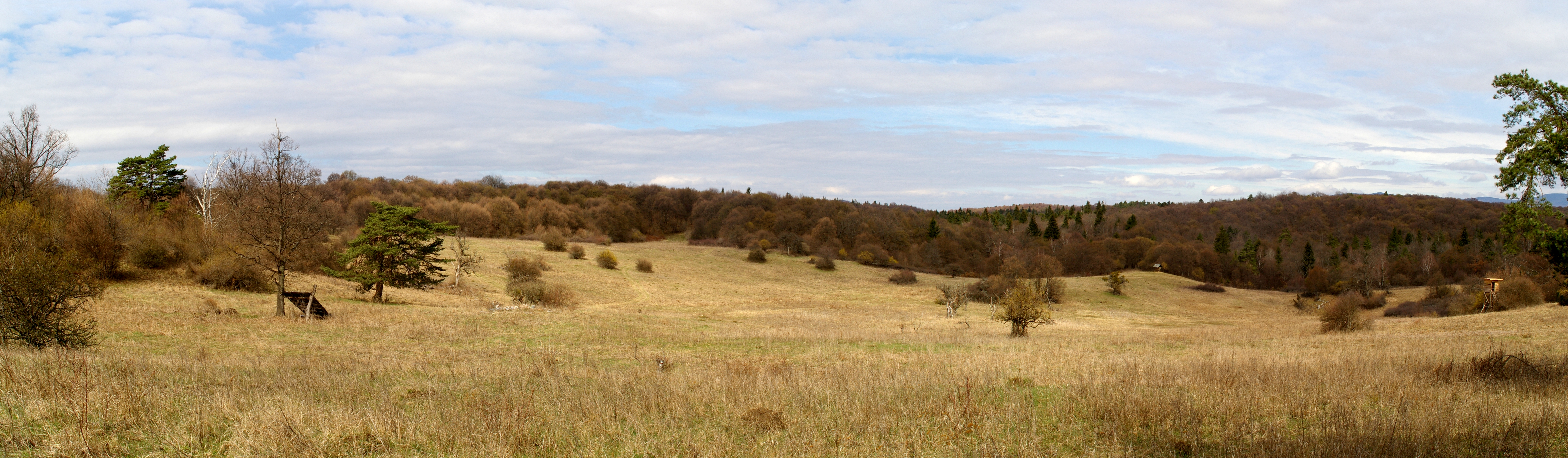 Silická planina (u Rakyty)